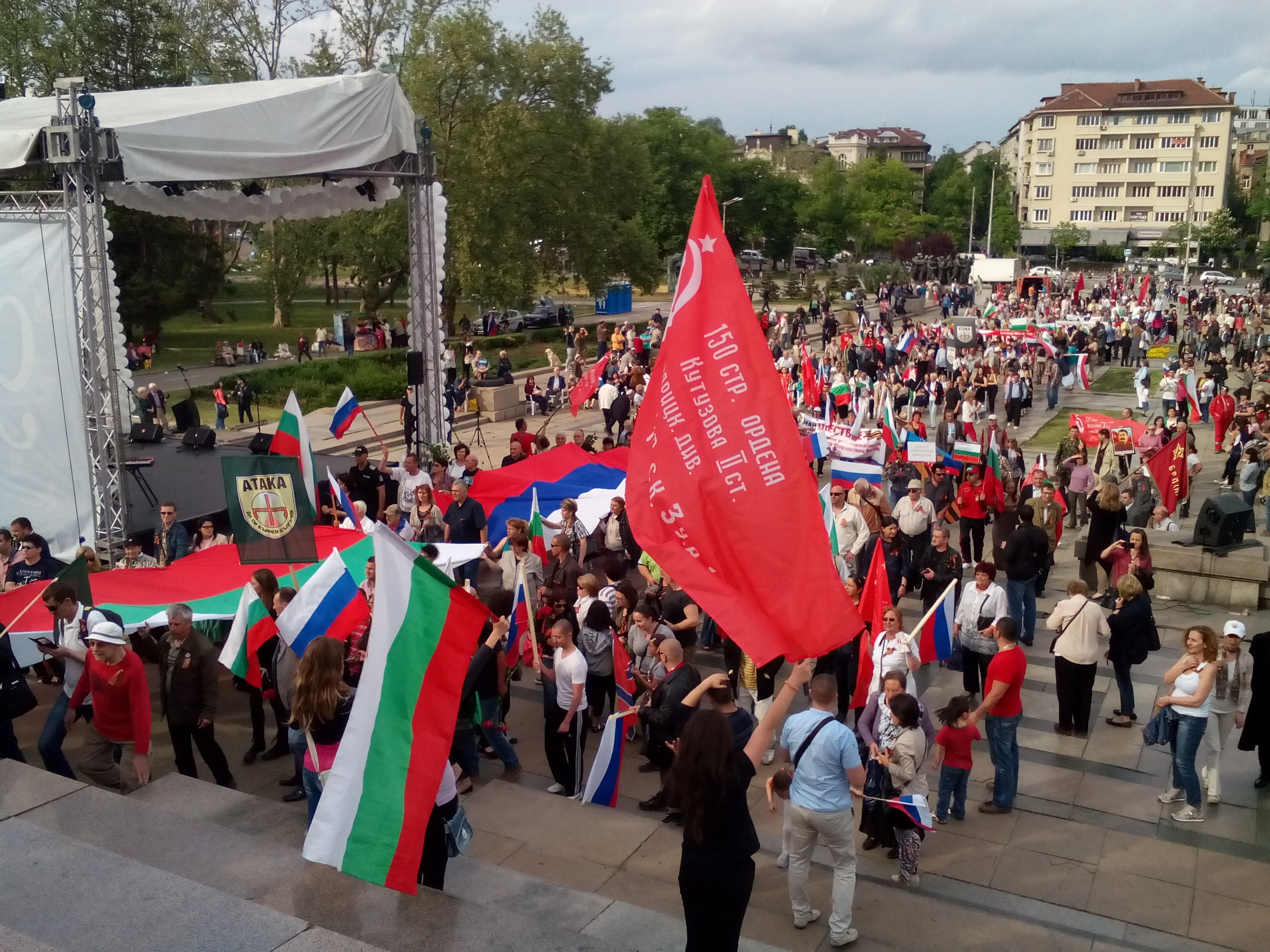 Българският народ поднася цветя и венци на Паметника на Съветската армия в София по случай Деня на победата над фашизма.